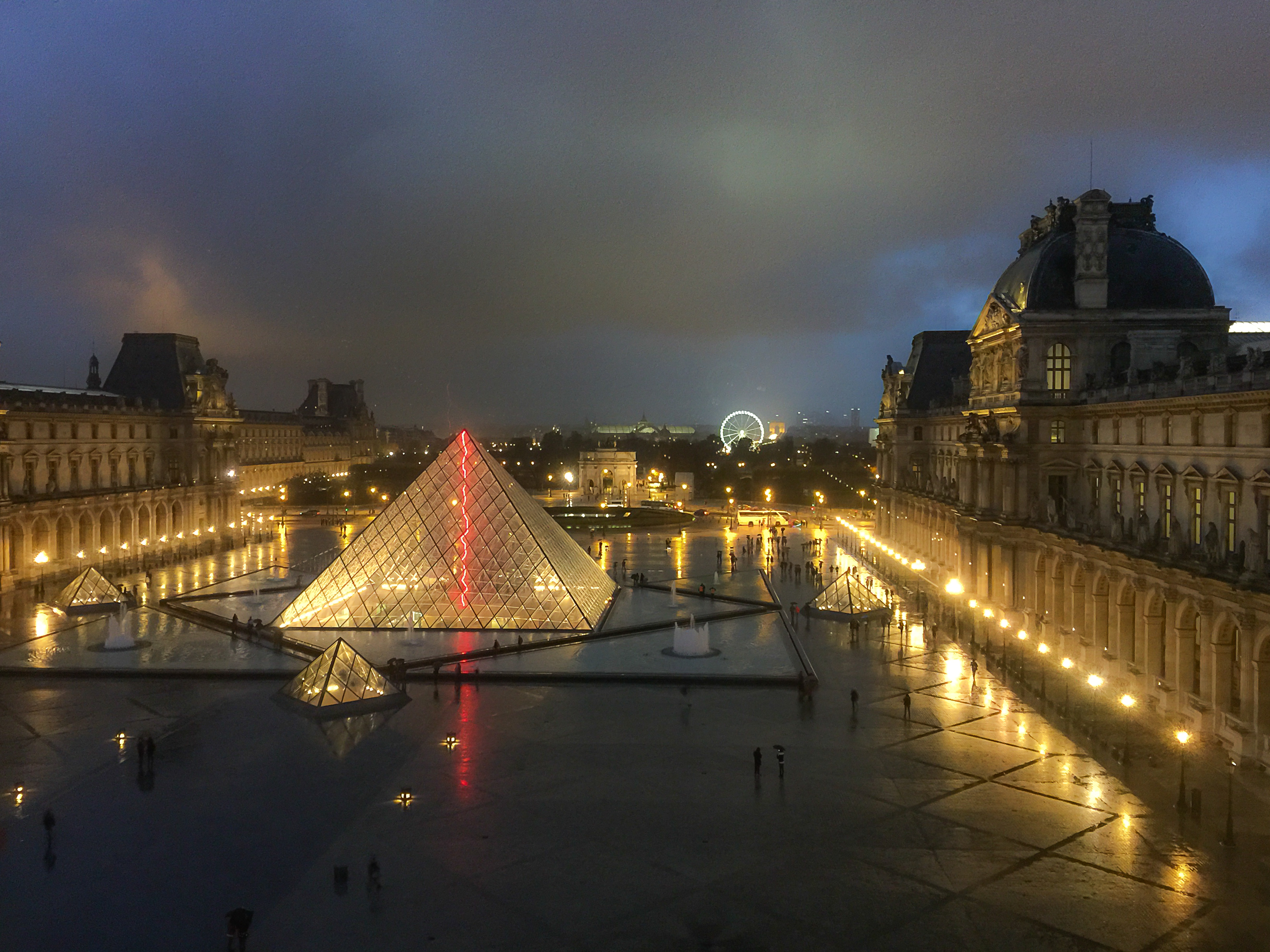 Claude Lévêque's installation at the Louvre Pyramid by I.M. Pei